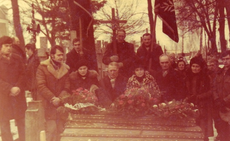 Pogrzeb w Jabłonce Kościelnej lata 1980